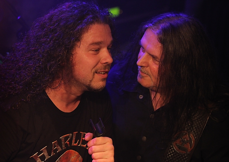 Jan Toužimský a Jiří Urban, členové skupiny Arakain.